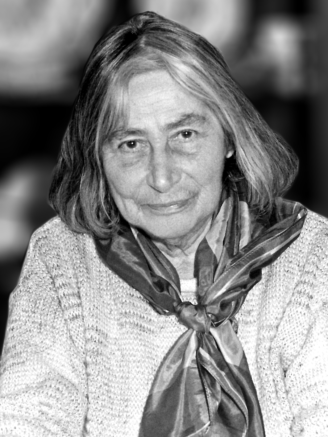 Porträtfotografie der Künstlerin Vera Kopetz